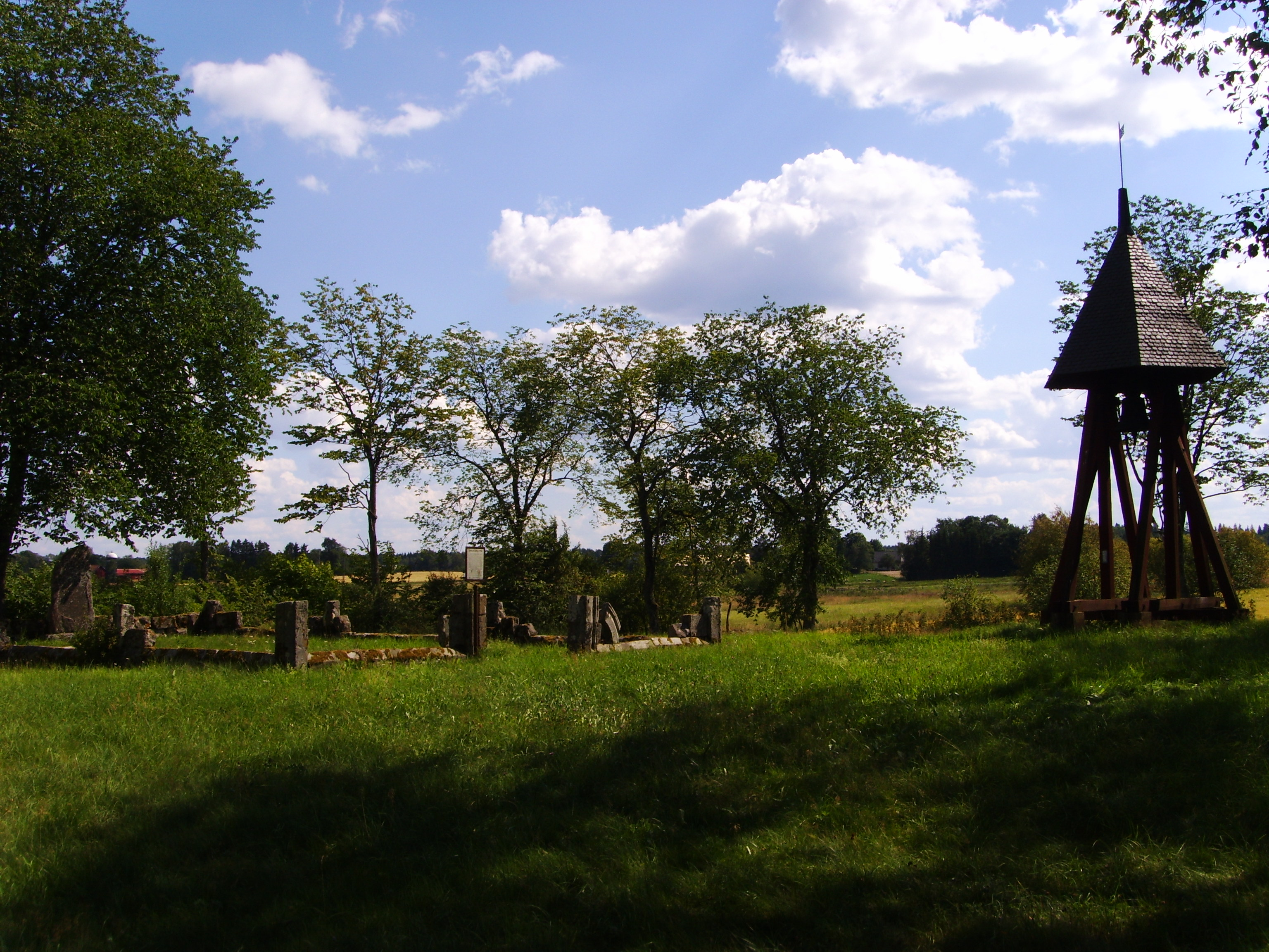 Tarsleds gamla kyrka har ett okänt byggnadsår, men traditionen vill berätta, att den uppfördes i slutet av 1100-talet eller början av 1200-talet. Byggnaden murades huvudsakligen av sandsten och hade särskilt markerat kor, som genom en rundbågig muröppning, den s k triumfbågen, avskiljdes från kyrkorummet. Kyrkan saknade fönster på norra sidan. I koret fanns en markerad grav för löjtnant Tornberg. I en fristående klockstapel hängde en klocka, som enligt sägnen danskarna skulle ha tagit från Larv år 1611, men på sin återfärd tvungits lämna vid Tarsleds gamla kyrka. Den klockan hänger sedan 1865 i Herrljunga – Tarsleds gemensamt byggda kyrka, där också Tarsleds kyrkas lillklocka, som enligt uppgift lär ha inköpts från Västerbitterna år 1789, fått sin plats. År 1863 nedrevs Tarsleds gamla kyrka, som var den största inom Herrljunga pastorat, och år 1865 fick Tarsled gemensam kyrka med Herrljunga. En stensättning å Tarsleds kyrkogård markerar den gamla kyrkans läge och storlek. På minnesstenen därstädes läses följande: ”Till minne av Tarsleds kyrka, uppförd sannolikt på 1100-talet. Nedriven 1863. Församlingsbor reste stenen 1909.” Tarsleds nuvarande klockstapel och kyrkklocka invigdes 1956 av biskop Sven Danell.